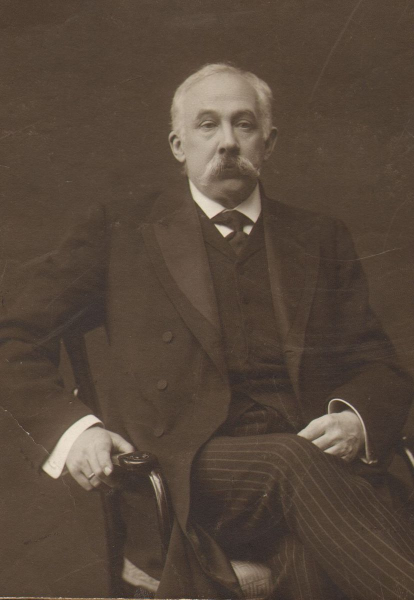 Eduardas Volteris